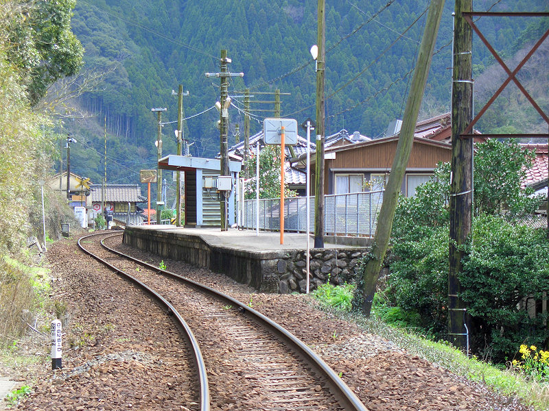 JR肥薩線鎌瀬駅 ホーム 北側の踏切より撮影 写真手前が八代駅方面。奥に見える踏切を渡ると球磨川第一橋梁。 撮影者/著者/著作権保有者 : MK Products (本人がアップロード) 撮影日 : 2007/03/07 鎌瀬駅用にアップロードした画像です。良い画像があれば別の画像に変えてください。